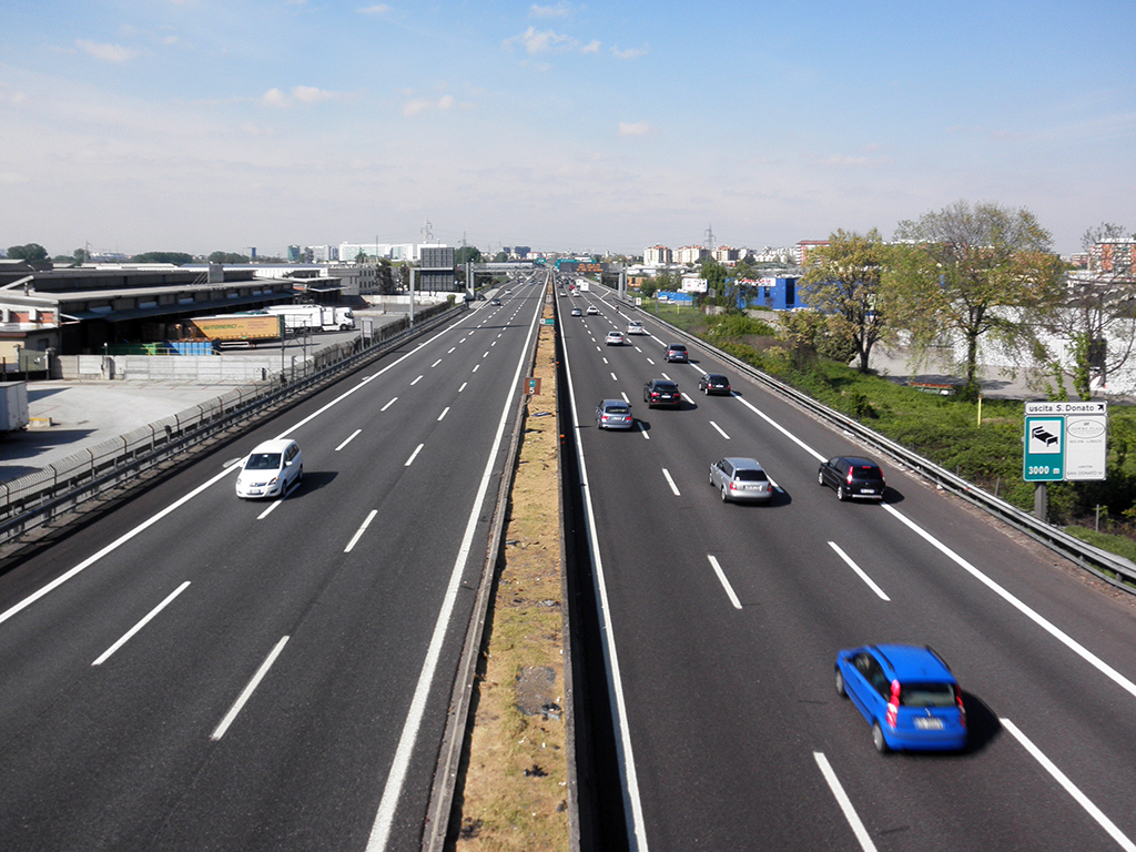 San Giuliano Milanese, autostrada A1.